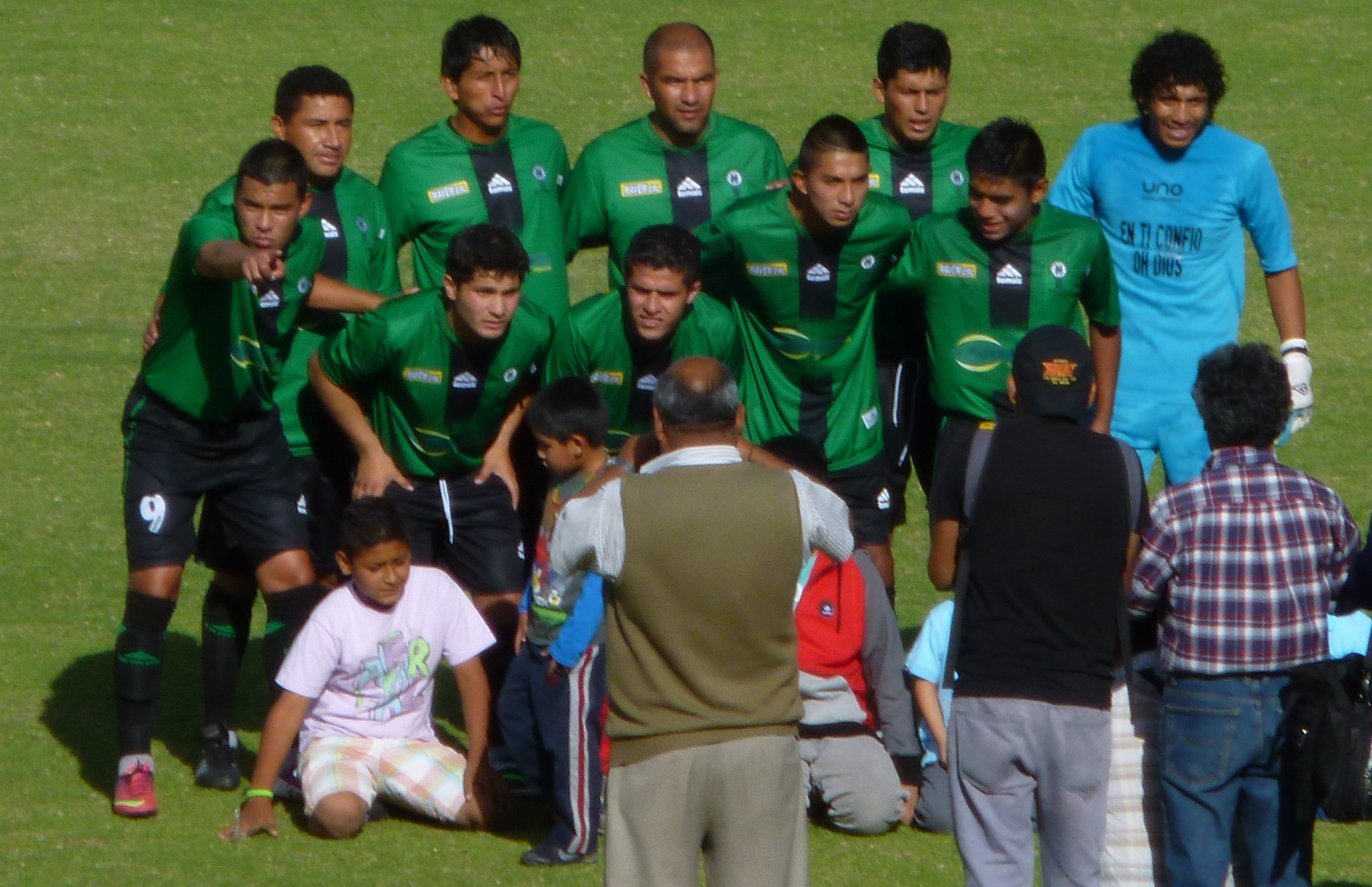 Equipo del Sportivo Huracán 2014. Participante de la Copa Perú.